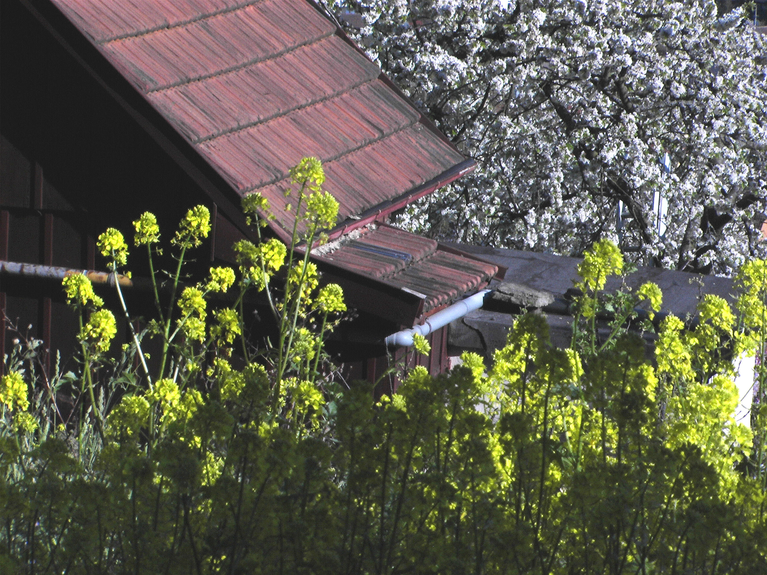 Ackersenf und Kirschbaumblüte